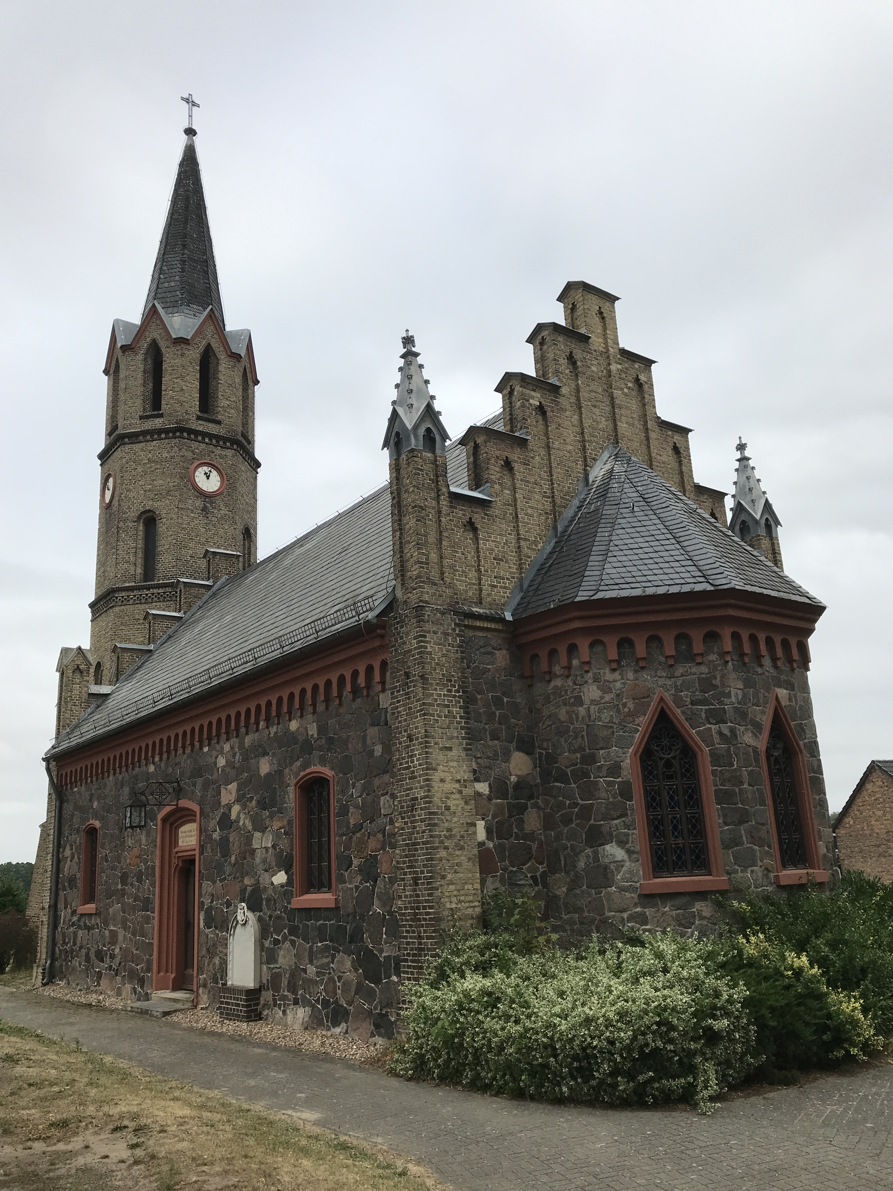 Die neugotische Dorfkirche in Plessow der Stadt Werder (Havel) entstand im 19. Jahrhundert aus Feldsteinen und Mauersteinen.